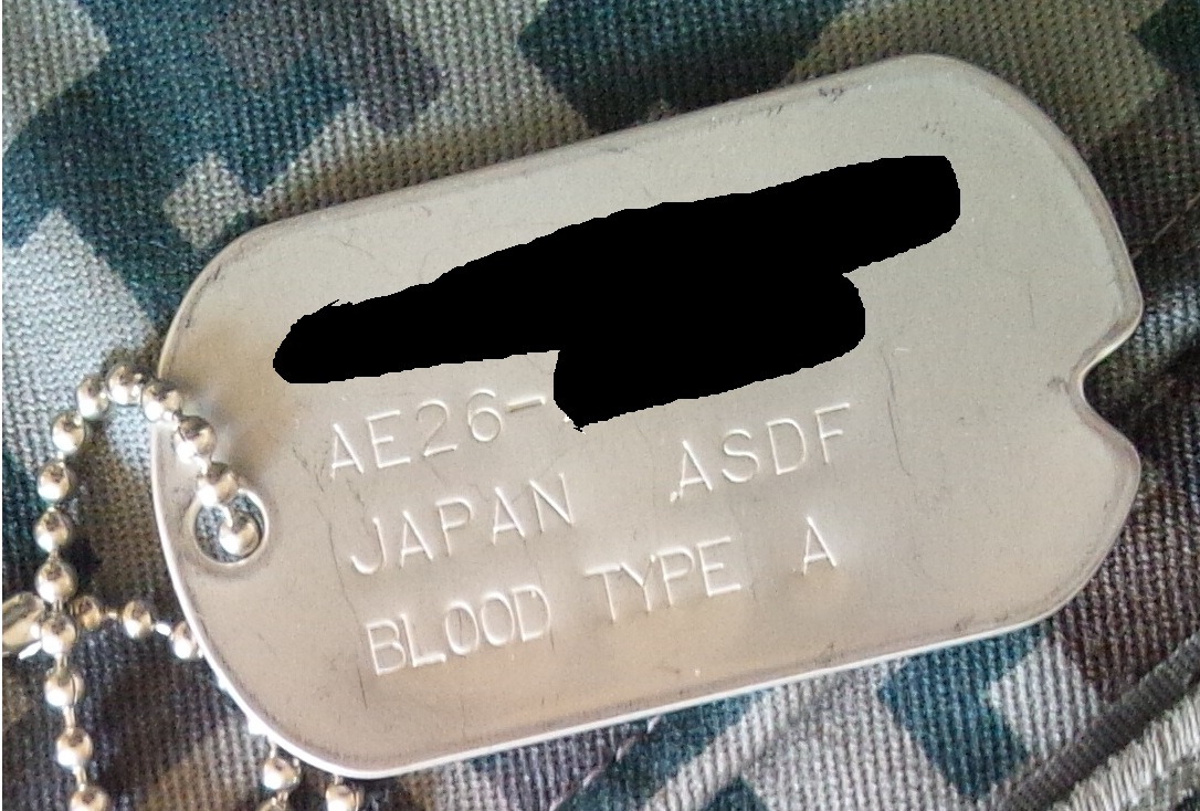 航空自衛隊認識票